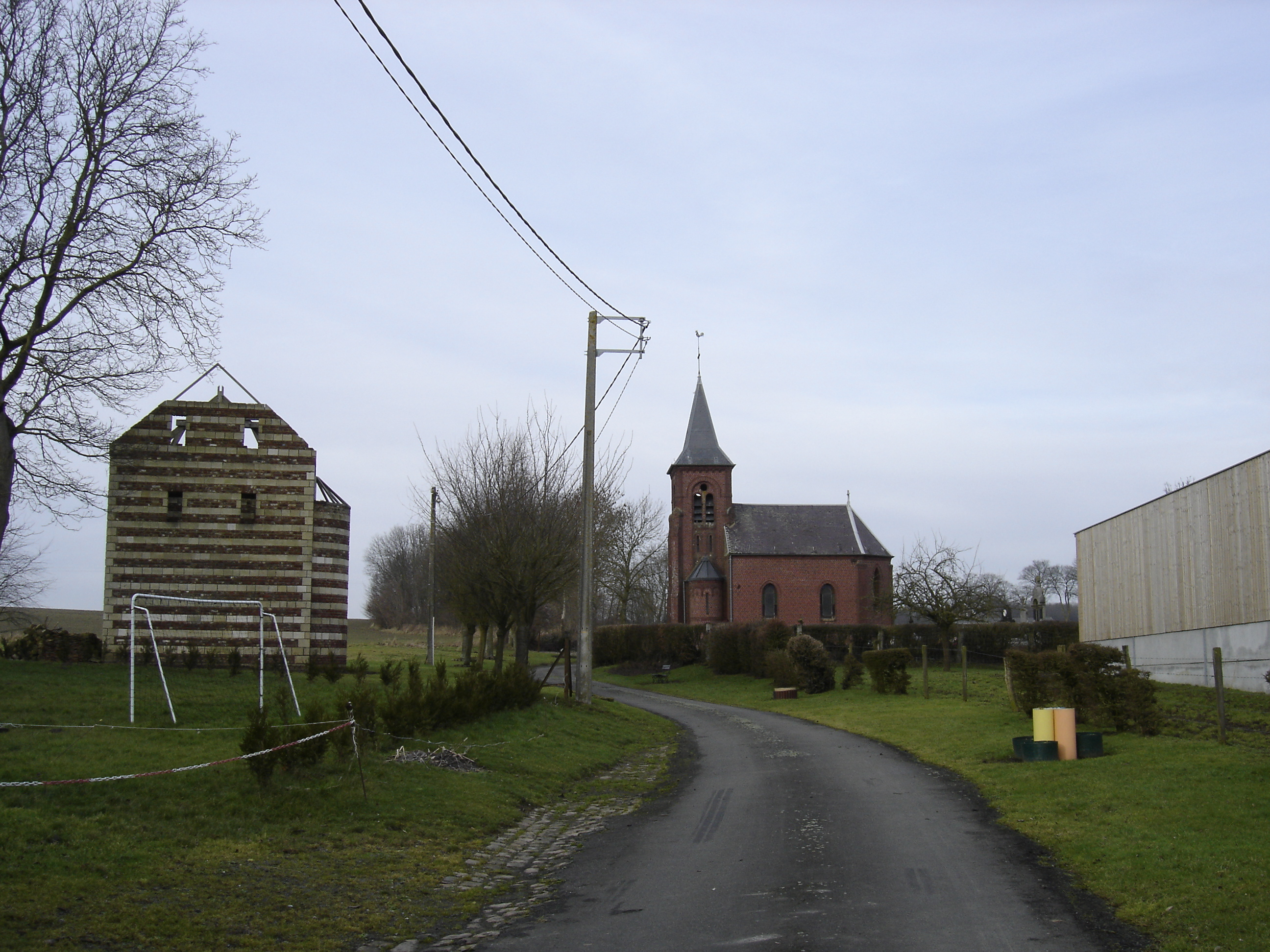 Église de Dehéries